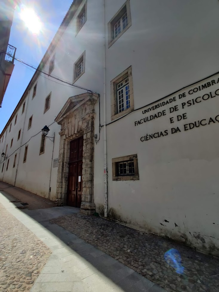 Porta da Entrada do Edifício 1 da Faculdade de Psicologia e Ciências da Educação da Universidade de Coimbra